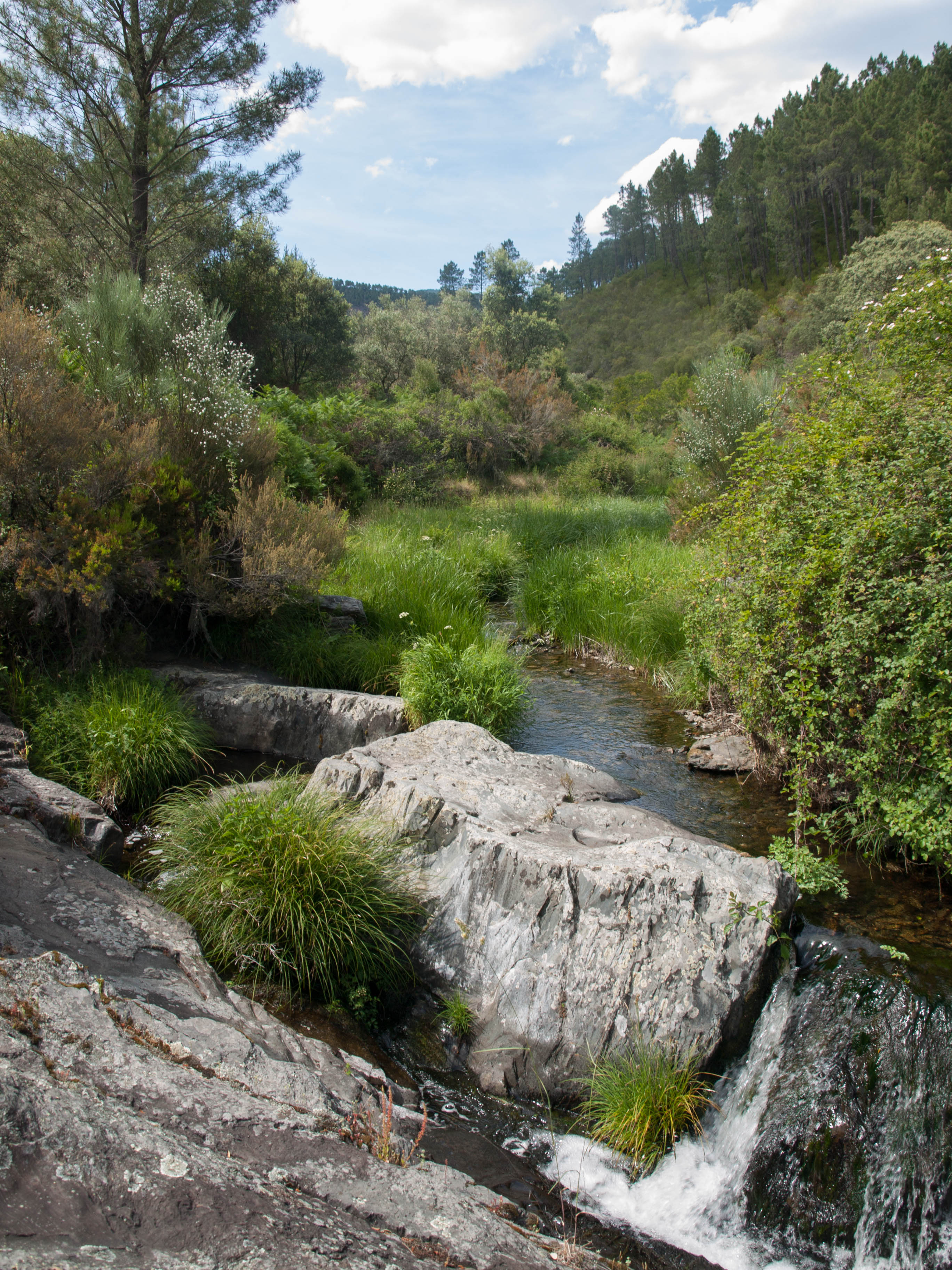 Arroyo cerca de Rubiaco. Municipio de Nuñomoral, provincia de Cáceres, España.